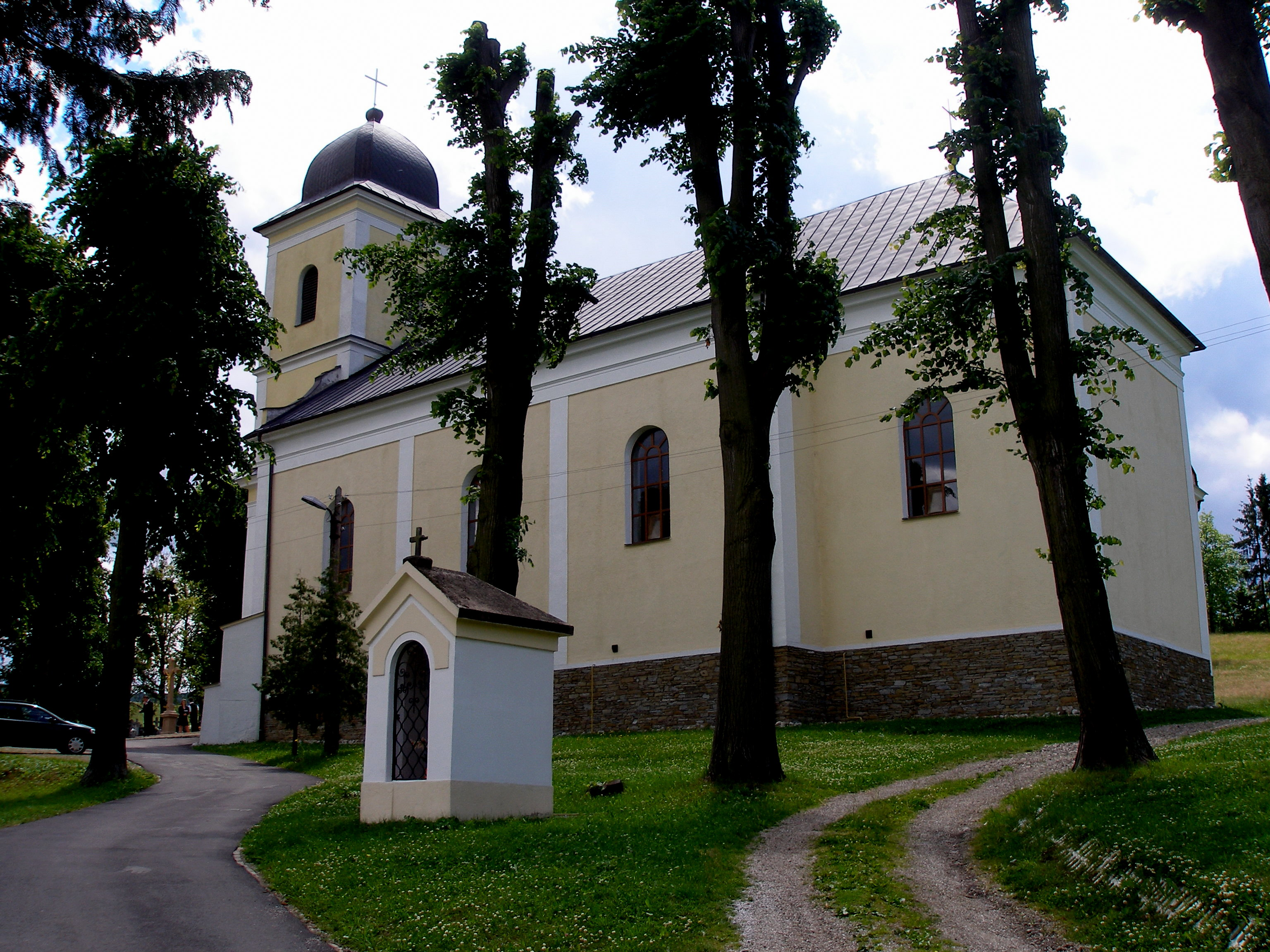 Obec Rožkovany okres Sabinov